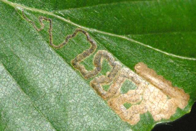 Stigmella tityrella from Commanster, Belgian High Ardennes .